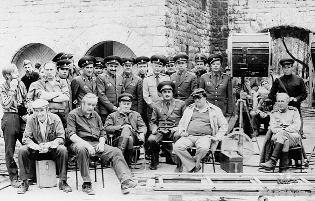 Съемка фильма Фронт в тылу врага